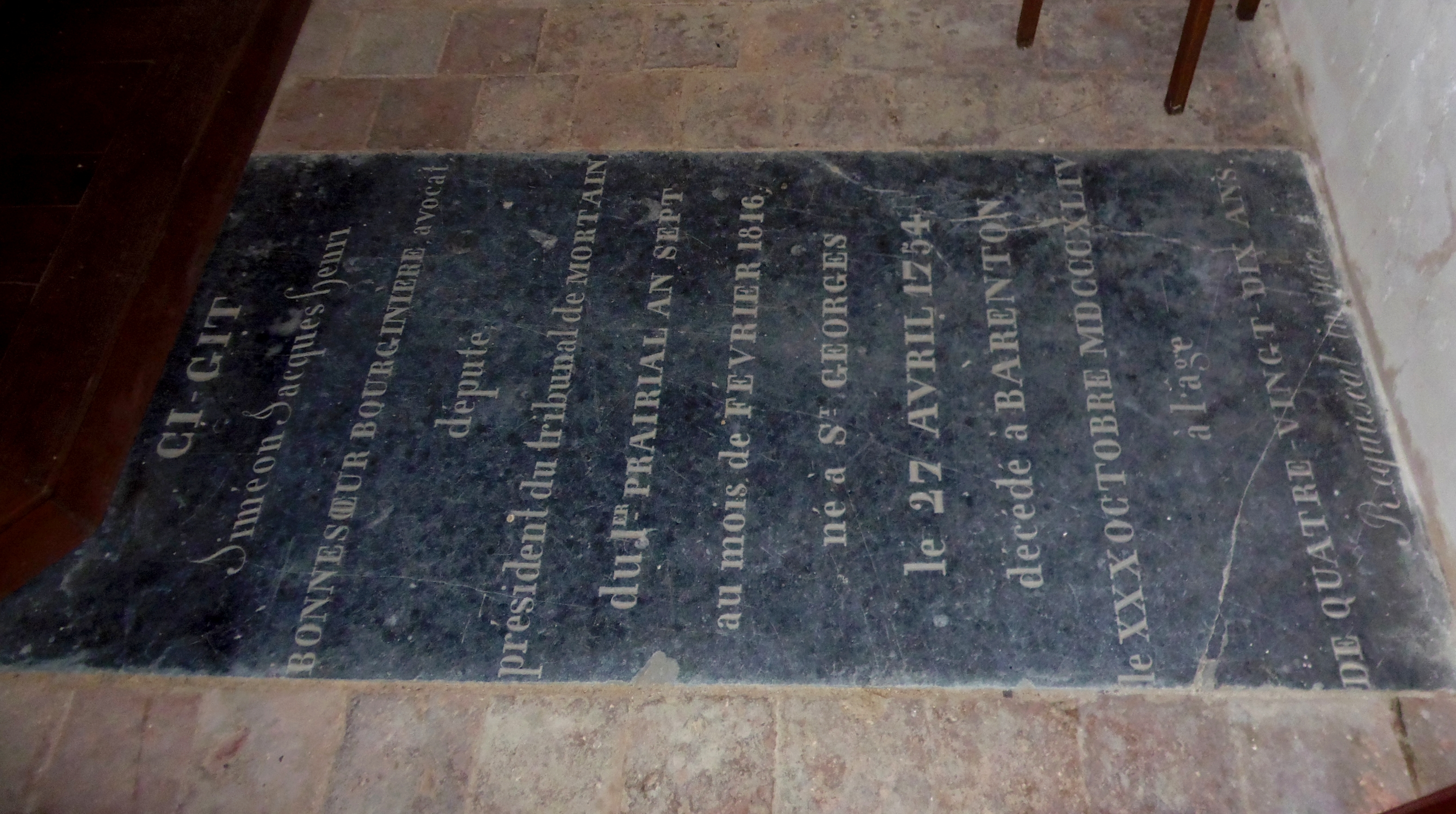 Barenton (Normandie, France). La dalle funéraire de Siméon Bonnesœur-Bourginière.